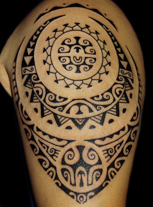 Épaule tatouée par Manu Farrarons.